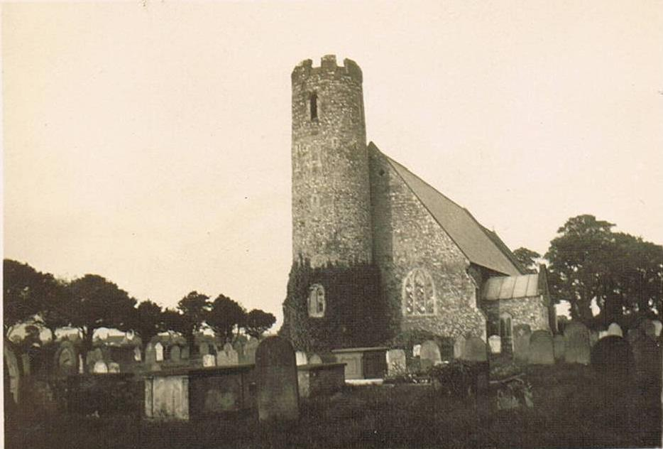 Blundeston Church